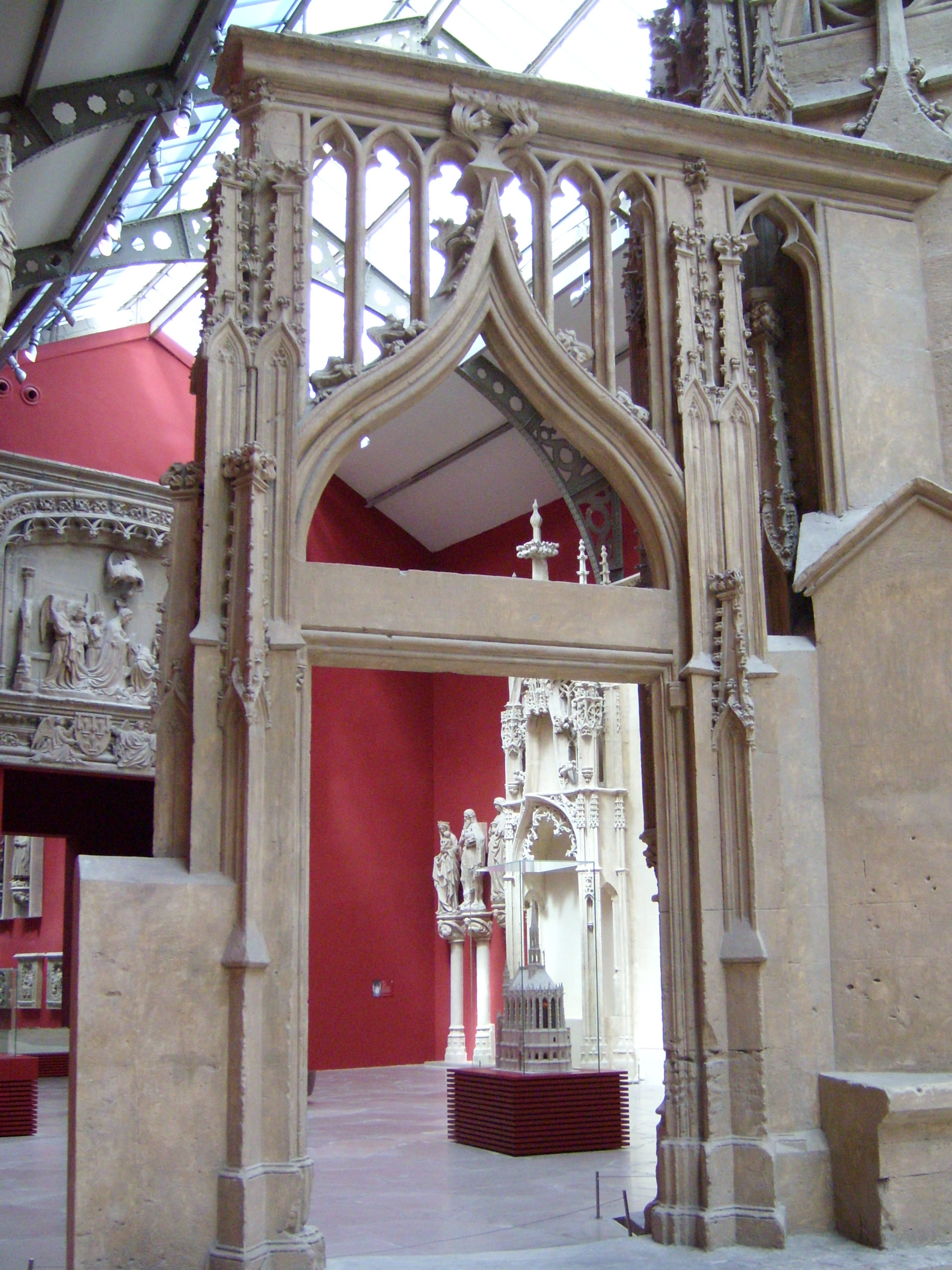 Galerie des Moulages, Musée des Monuments français, Paris